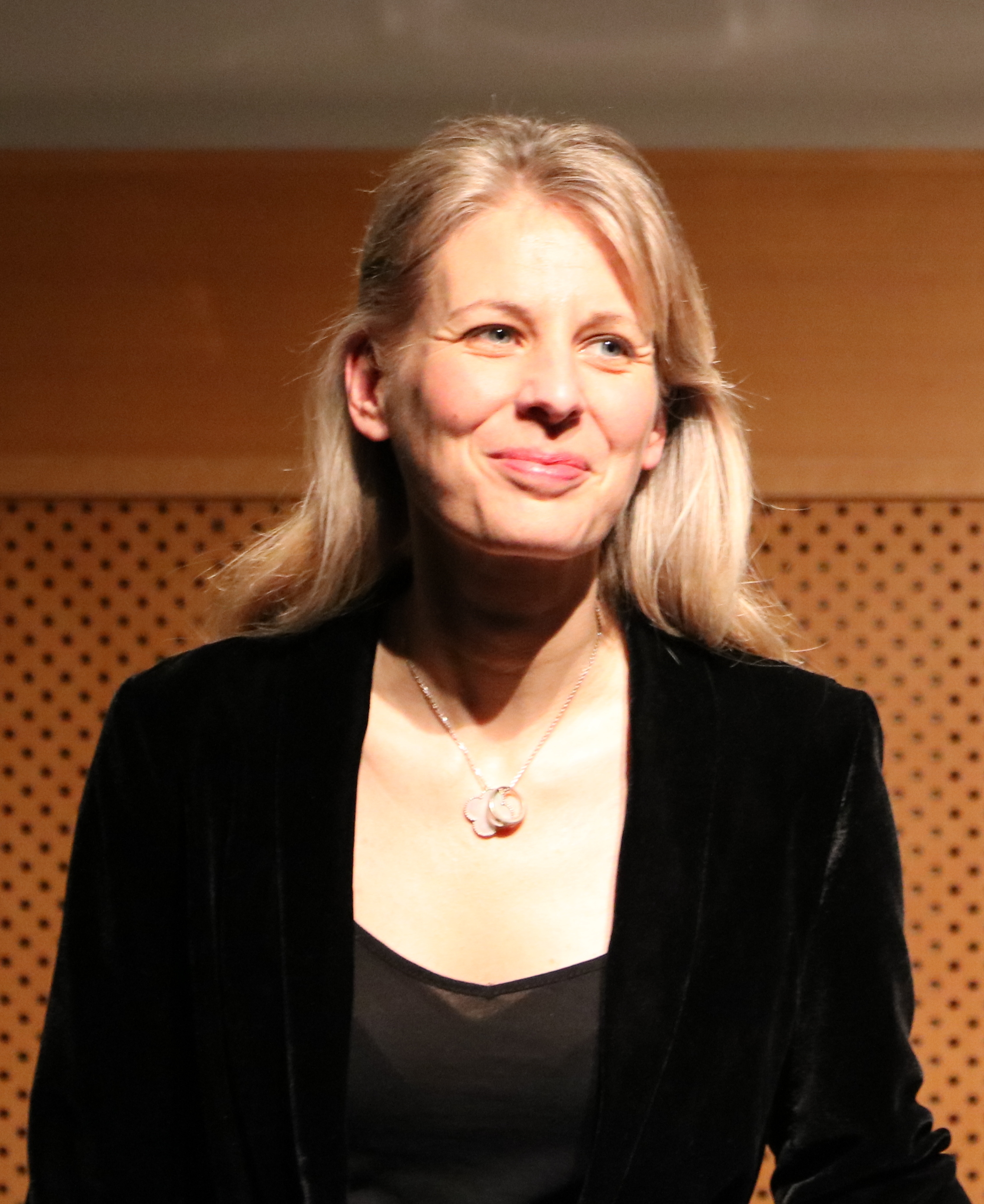 Claire-Marie Le Guay, pianiste, concert, le 3 février 2017, Folle Journée, Nantes. 0529